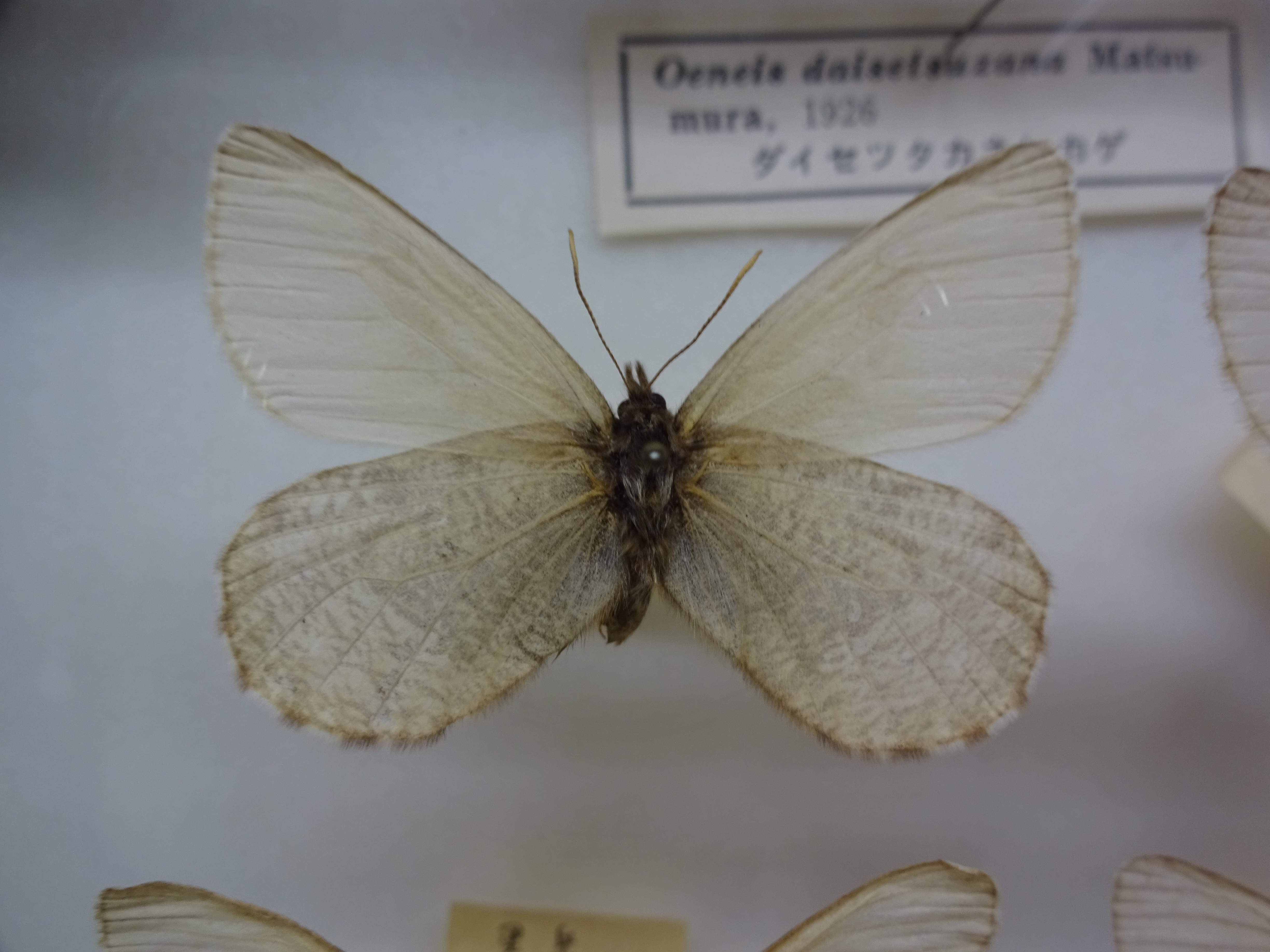 ダイセツタカネヒカゲ